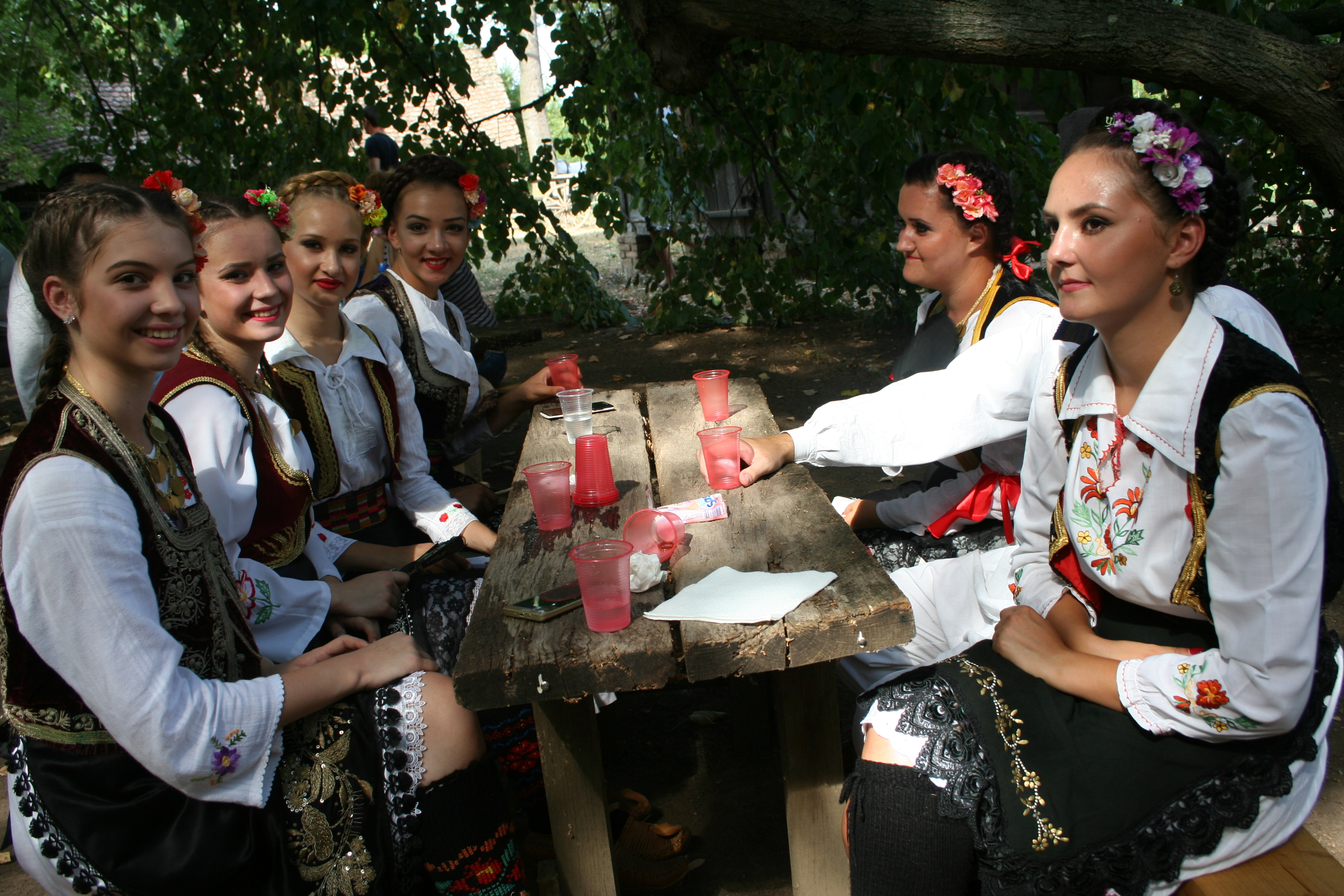 Prikaz svadbe u Mačvi, u okviru manifestacije Hajdučko veče u Crnoj Bari, opština Bogatić